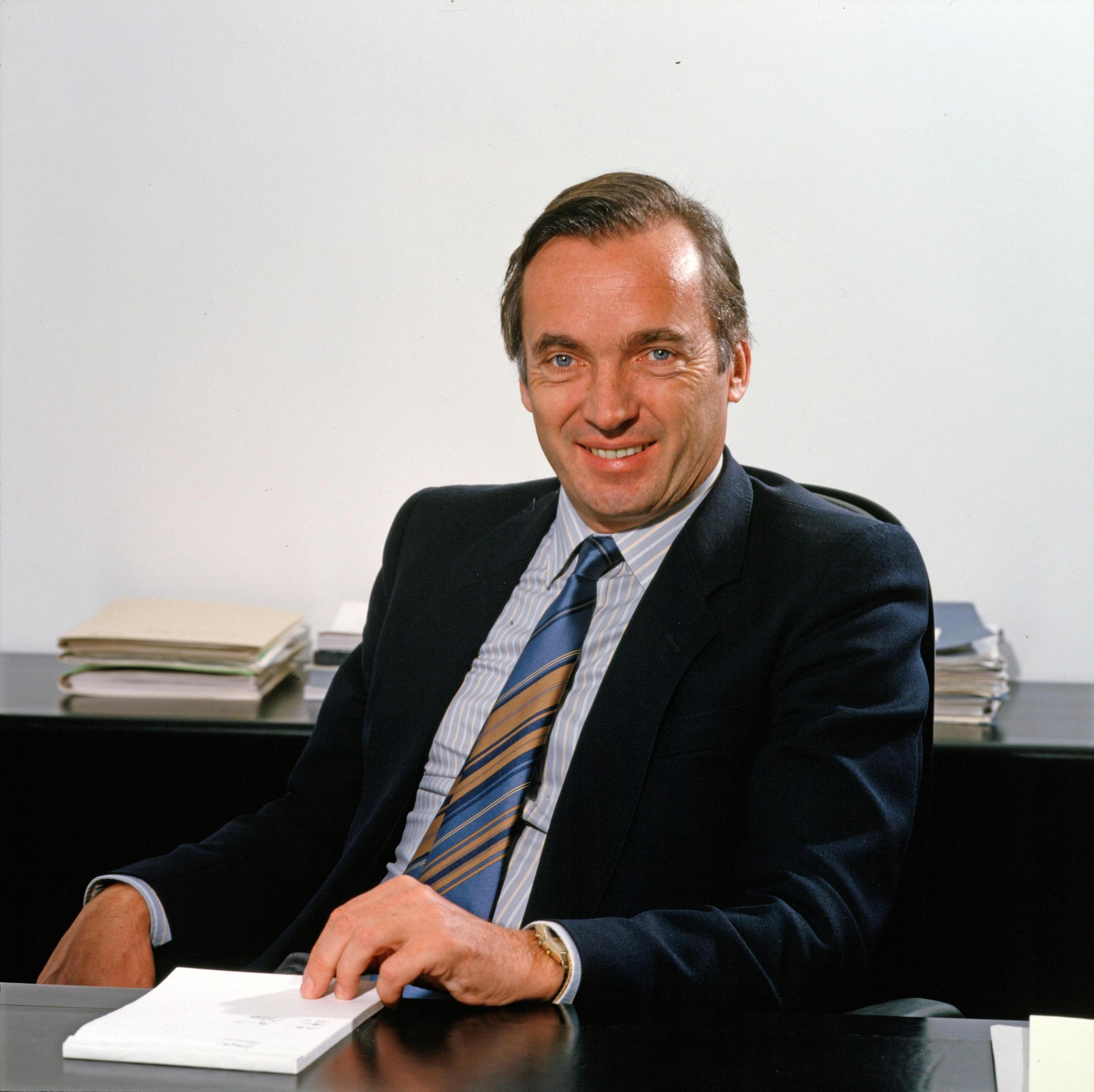 Guntram Lins war Landesrat in der Vorarlberger Landesregierung von 1984 bis 1994. Dies ist eine offizielle Portraitaufnahme vom 12. November 1984